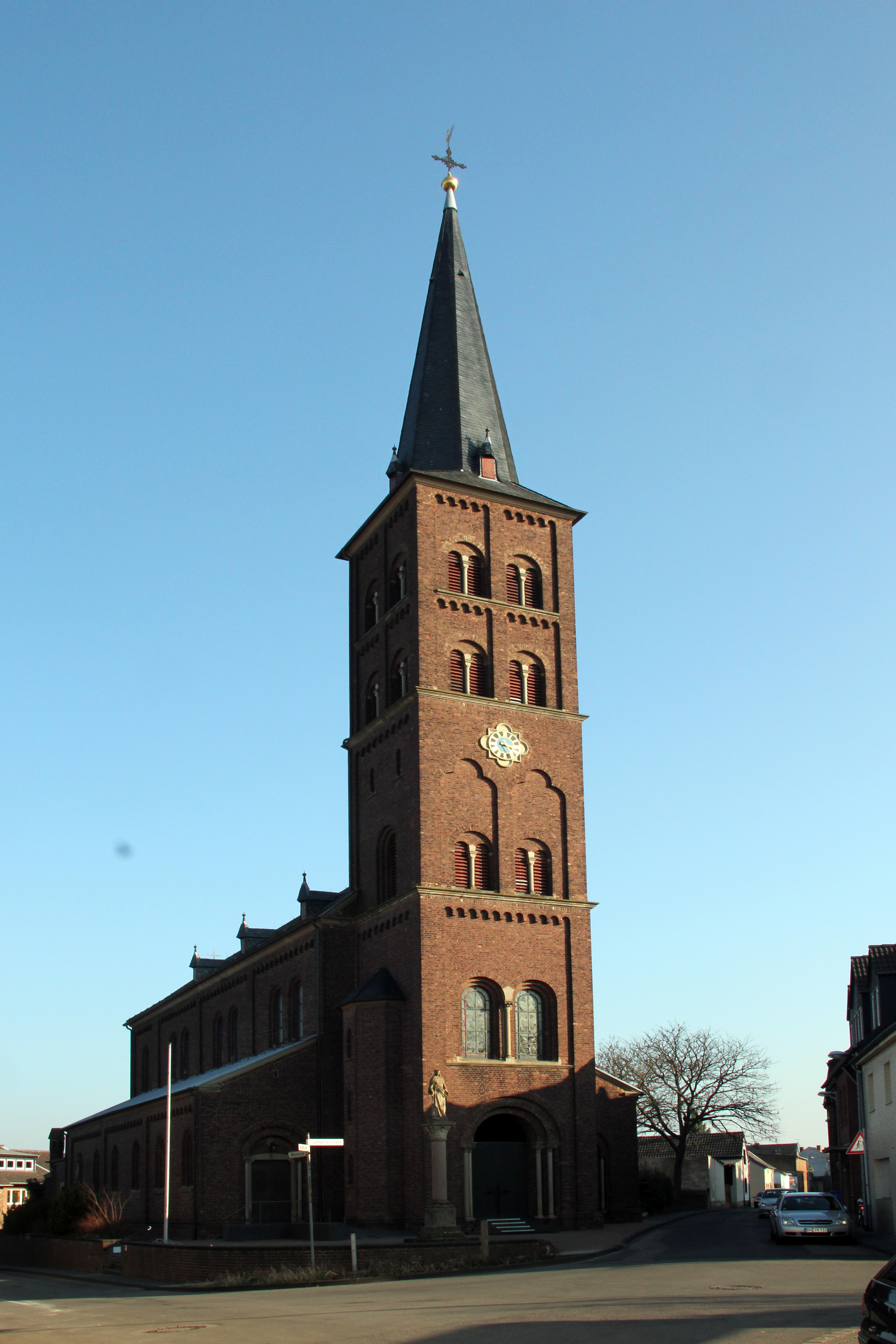 Bliesheim, die neuromanische Pfarrkirche Sankt Lambertus